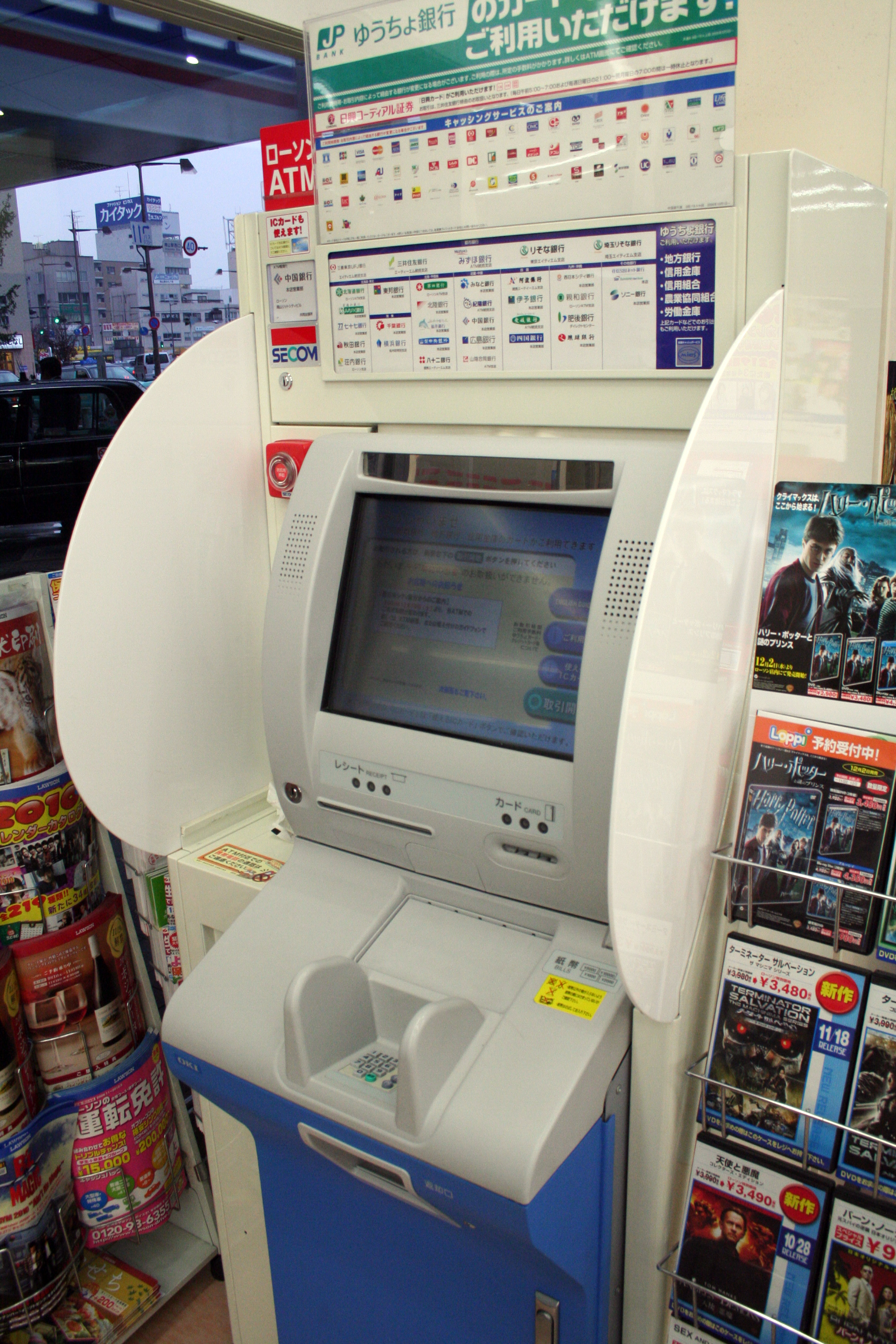 ローソンのコンビニエンスストア店内に設置されているローソンATM。